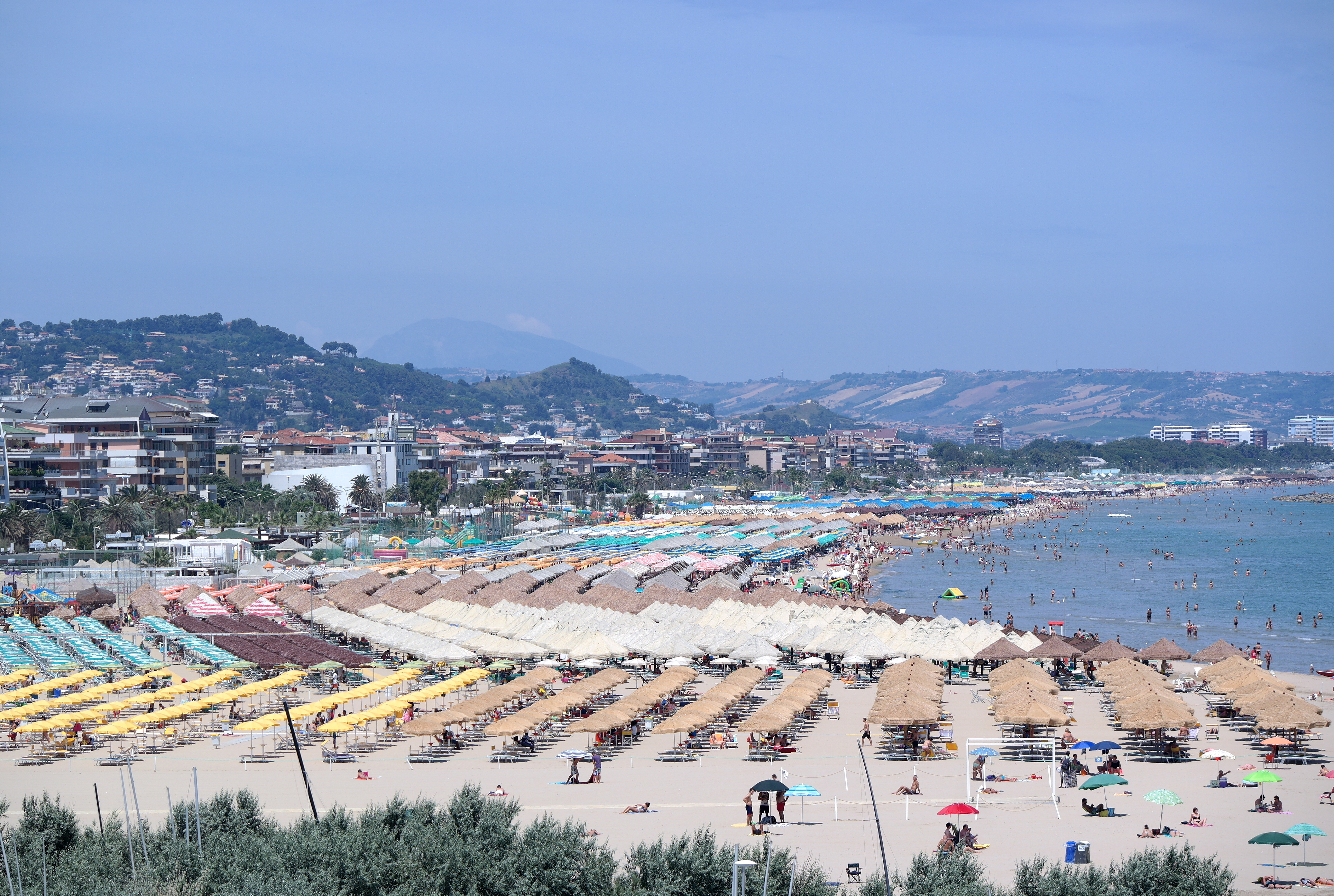 Spiaggia di pescara vista dal ponte del mare